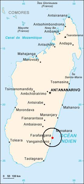 Farafangana, Madagascar